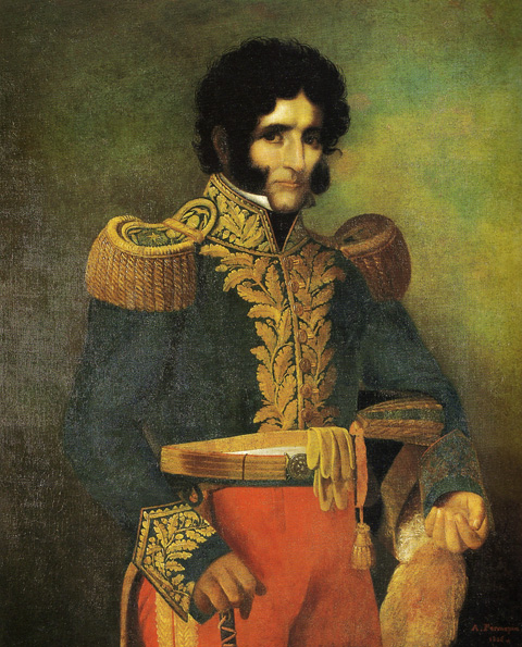 Retrato al óleo del militar argentino Facundo Quiroga, realizado por el fotógrafo y pintor francés Alfonso Fermepin.